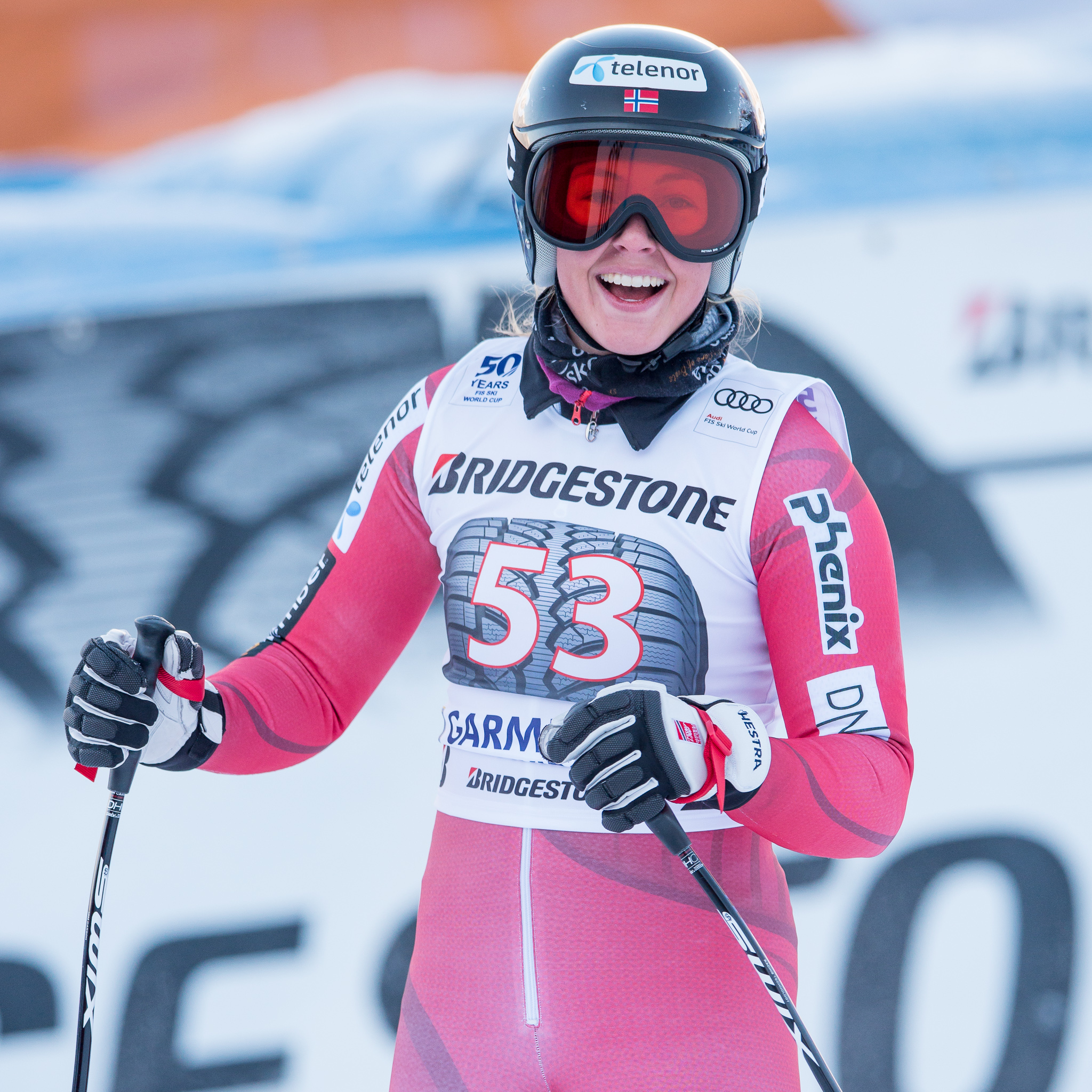 64. Kandahar Rennen,Audi FIS Ski Weltcup Garmisch-Partenkirchen,Damen Abfahrt,Kajsa Vickhoff Lie,Kandahar,Ladies Downhill